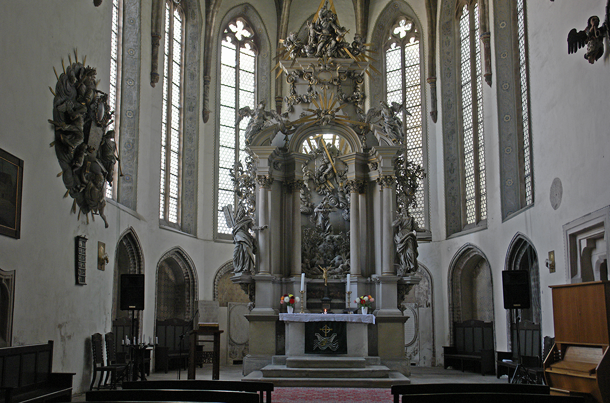 Görlitz, Dreifaltigkeitskirche (Altarraum)